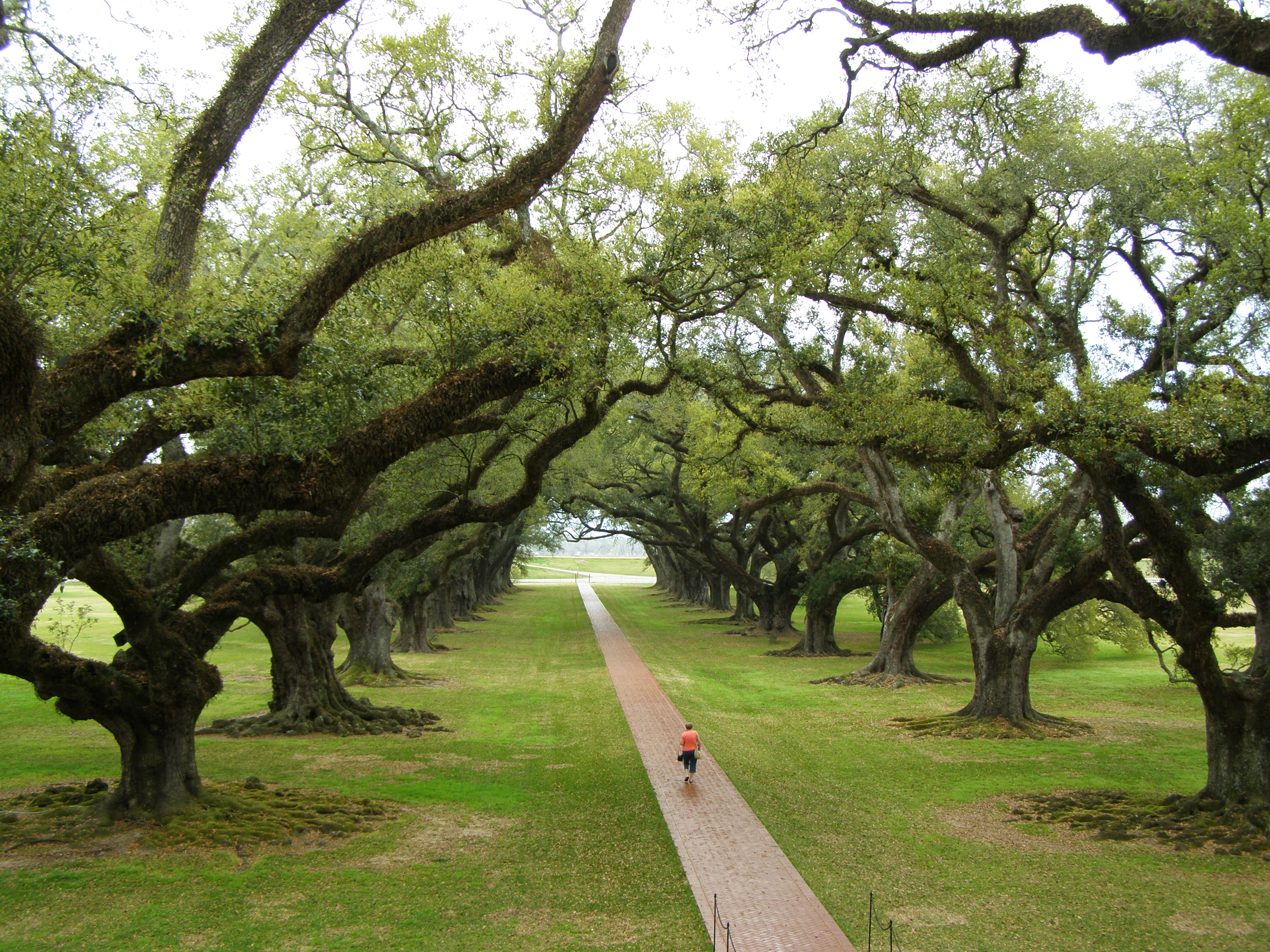 Oak Alley Plantation, Vacherie, Louisiana, USA, Quercus virginiana trees